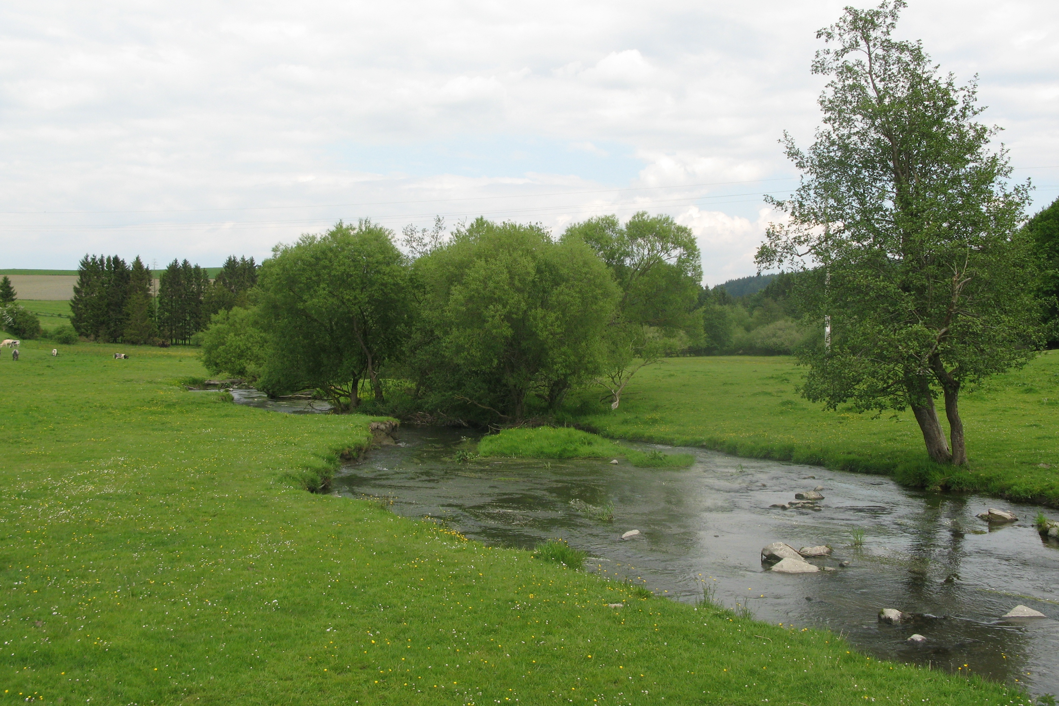 D'Wolz zu Benonchamps